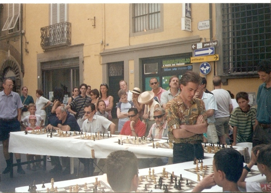 anno 2000